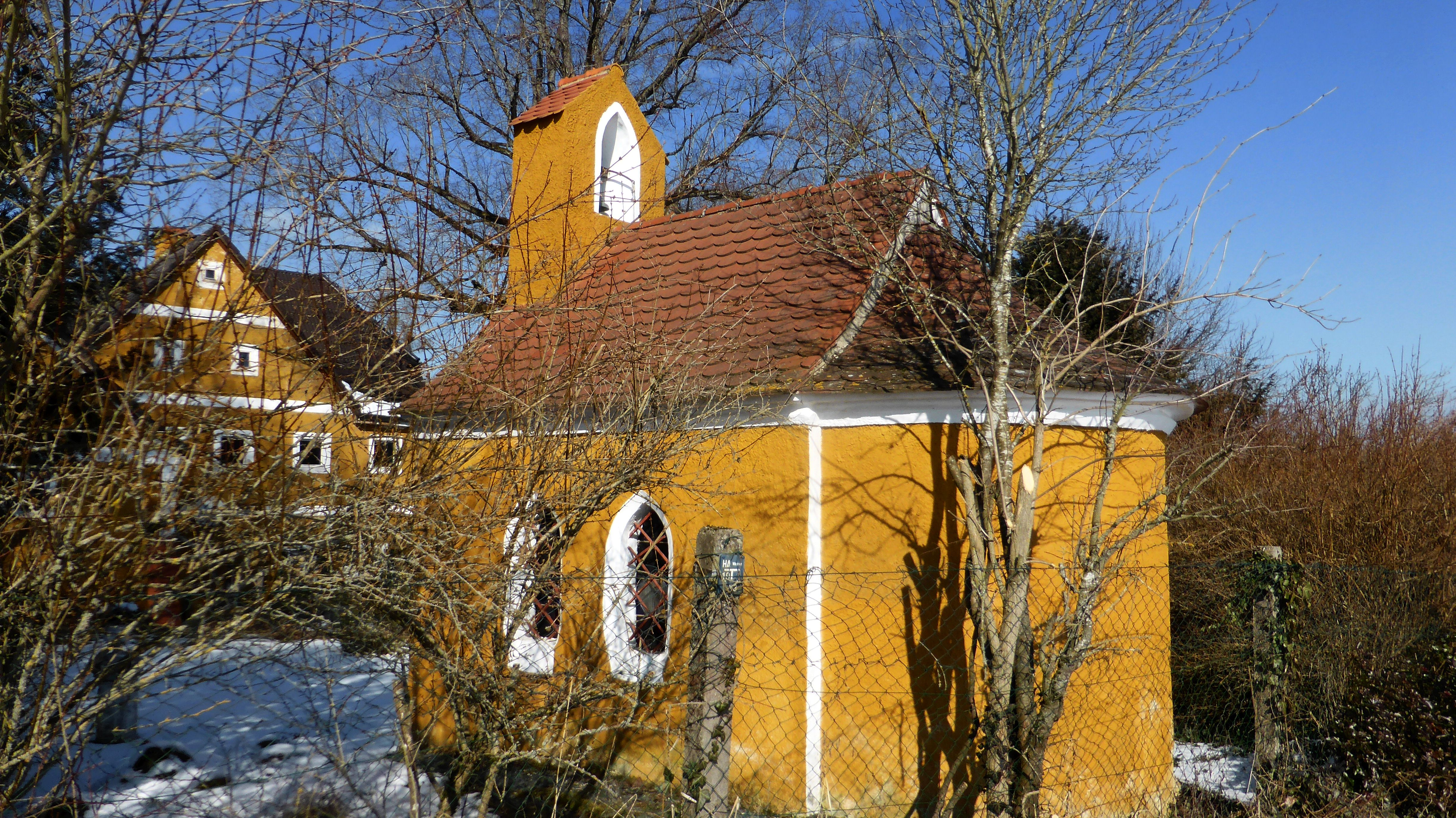 Ammelhof (Kapelle)